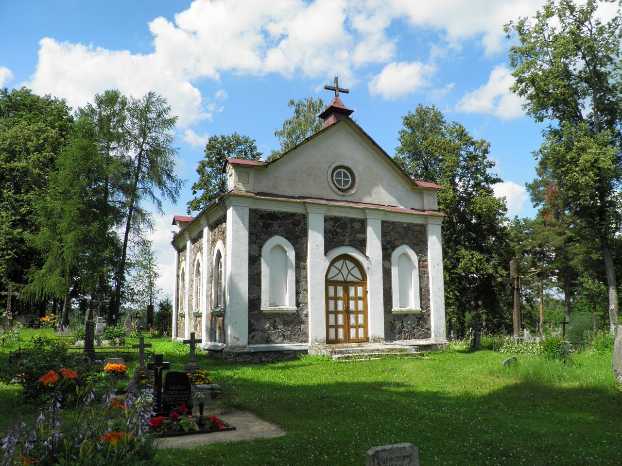 kapliča